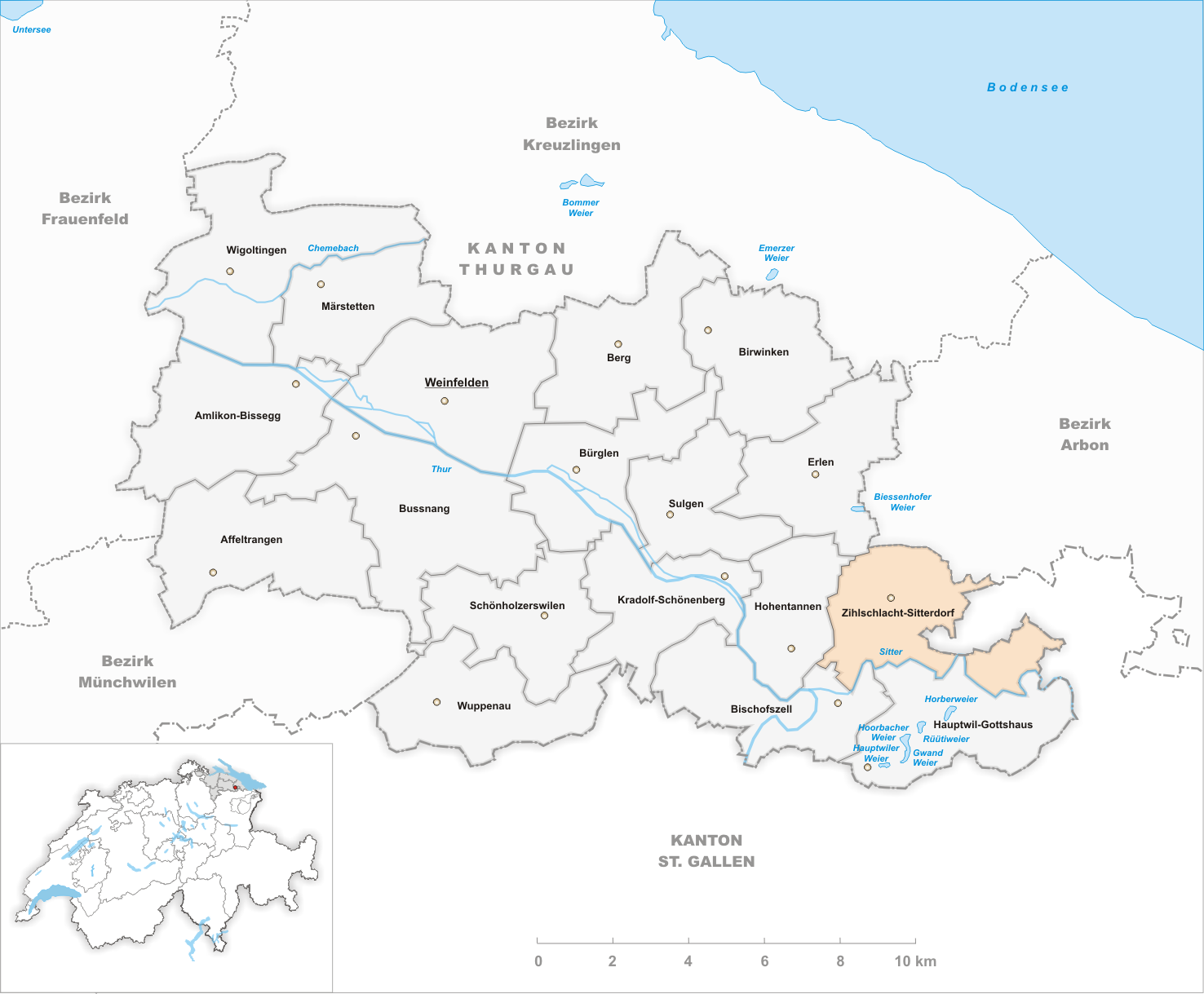 Municipality Zihlschlacht-Sitterdorf